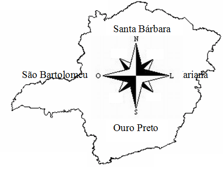 Posicionamento geográfico de Antonio Pereira.